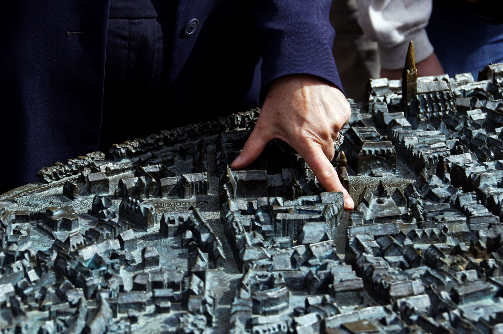 Modell der Lüneburger Altstadt mit Geste der Fremdenführerin